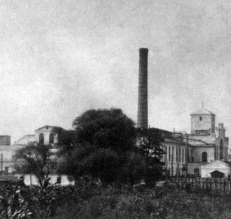 Шебекинский сахарный завод